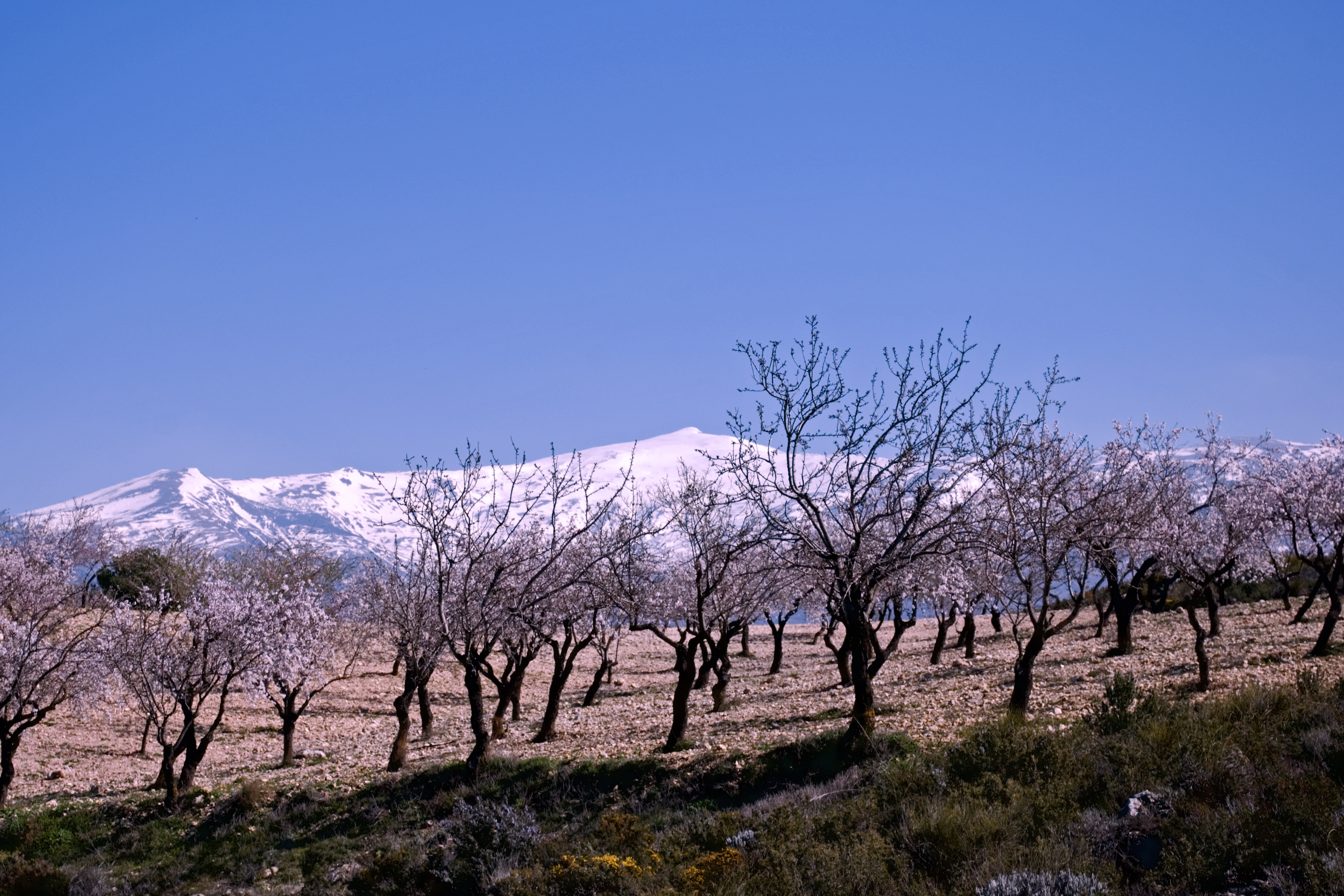 Paisaje de almendros, al fondo el pico del Caballo, en Sierra Nevada, provincia de Granada